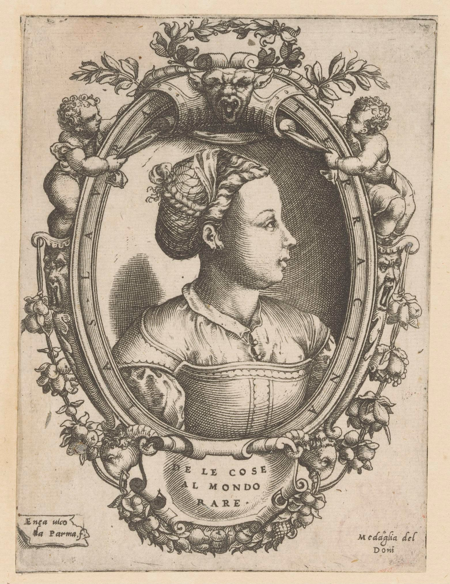 IdentificatieTitel(s): Portret van dichter Laura TerracinaPenningen van Anton Francesco Doni (serietitel)Medaglie del Doni (serietitel)Objecttype: prent Objectnummer: RP-P-OB-38.345Catalogusreferentie: The Illustrated Bartsch 248Bartsch 248Opschriften / Merken: verzamelaarsmerk, verso, gestempeld: Lugt 12Omschrijving: Portret van Laura Terracina, gevat in een geornamenteerde lijst.VervaardigingVervaardiger: prentmaker: Enea Vico (vermeld op object)Plaats vervaardiging: ItaliëDatering: 1550Fysieke kenmerken: gravureMateriaal: papier Techniek: graveren (drukprocedé)Afmetingen: blad: h 154 mm (binnen plaatrand afgesneden) × b 114 mm (binnen plaatrand afgesneden)OnderwerpWat: historical personswriter, poet, authorWie: Laura Bacio TerracinaVerwerving en rechtenVerwerving: onbekend 2006Copyright: Publiek domein